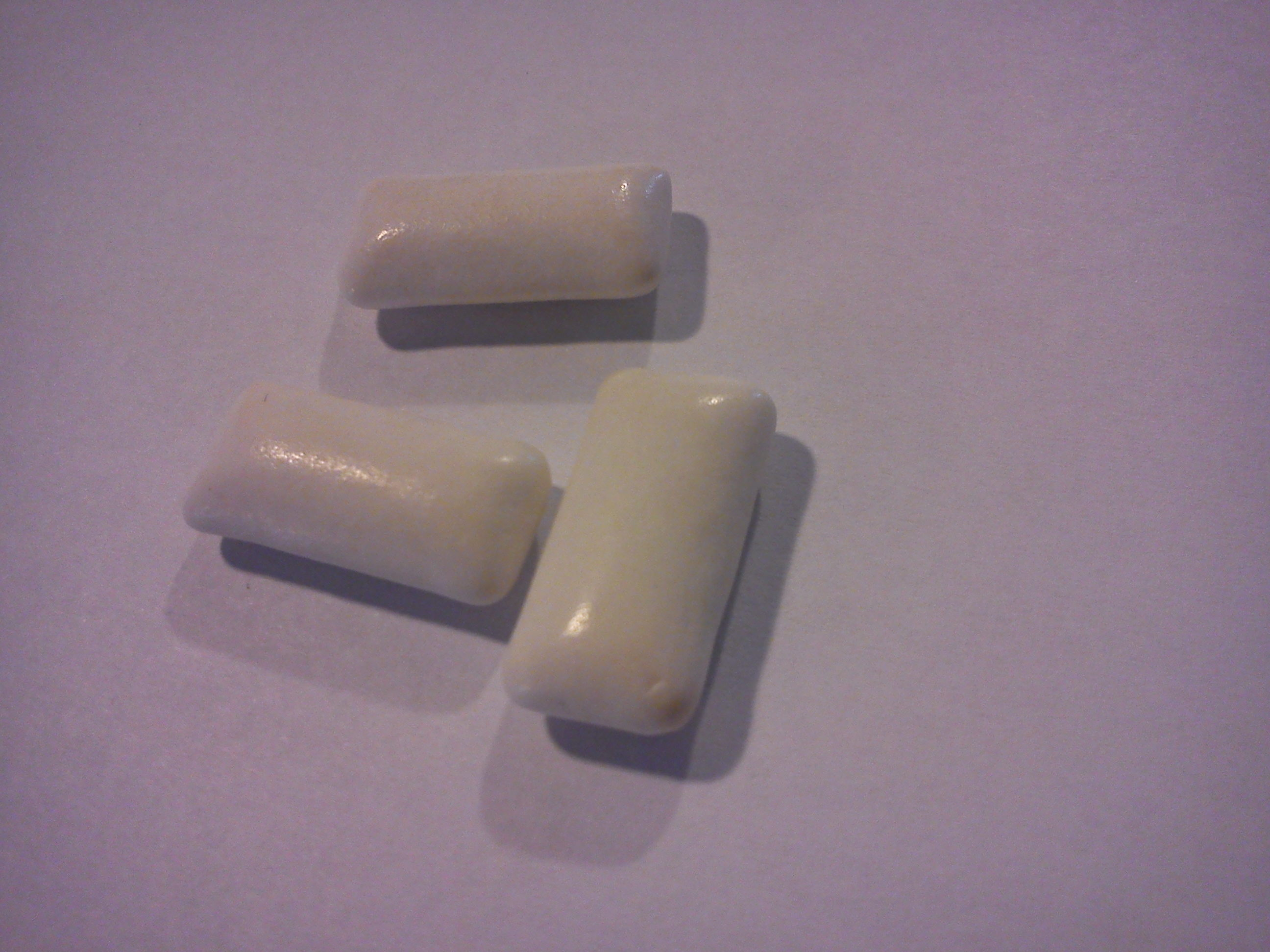 Žvečilni gumi, ki vsebuje kalijev acesulfam.